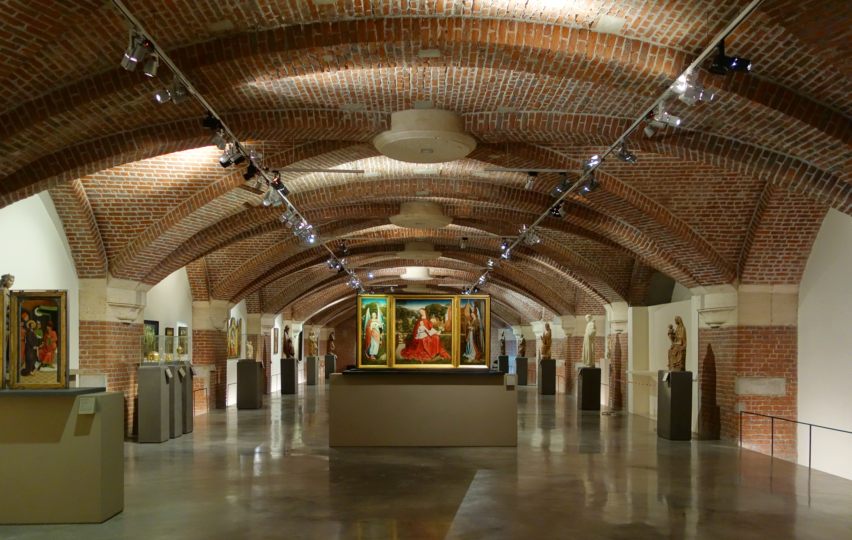 Salle des triptyques du Palais des beaux-arts de Lille.